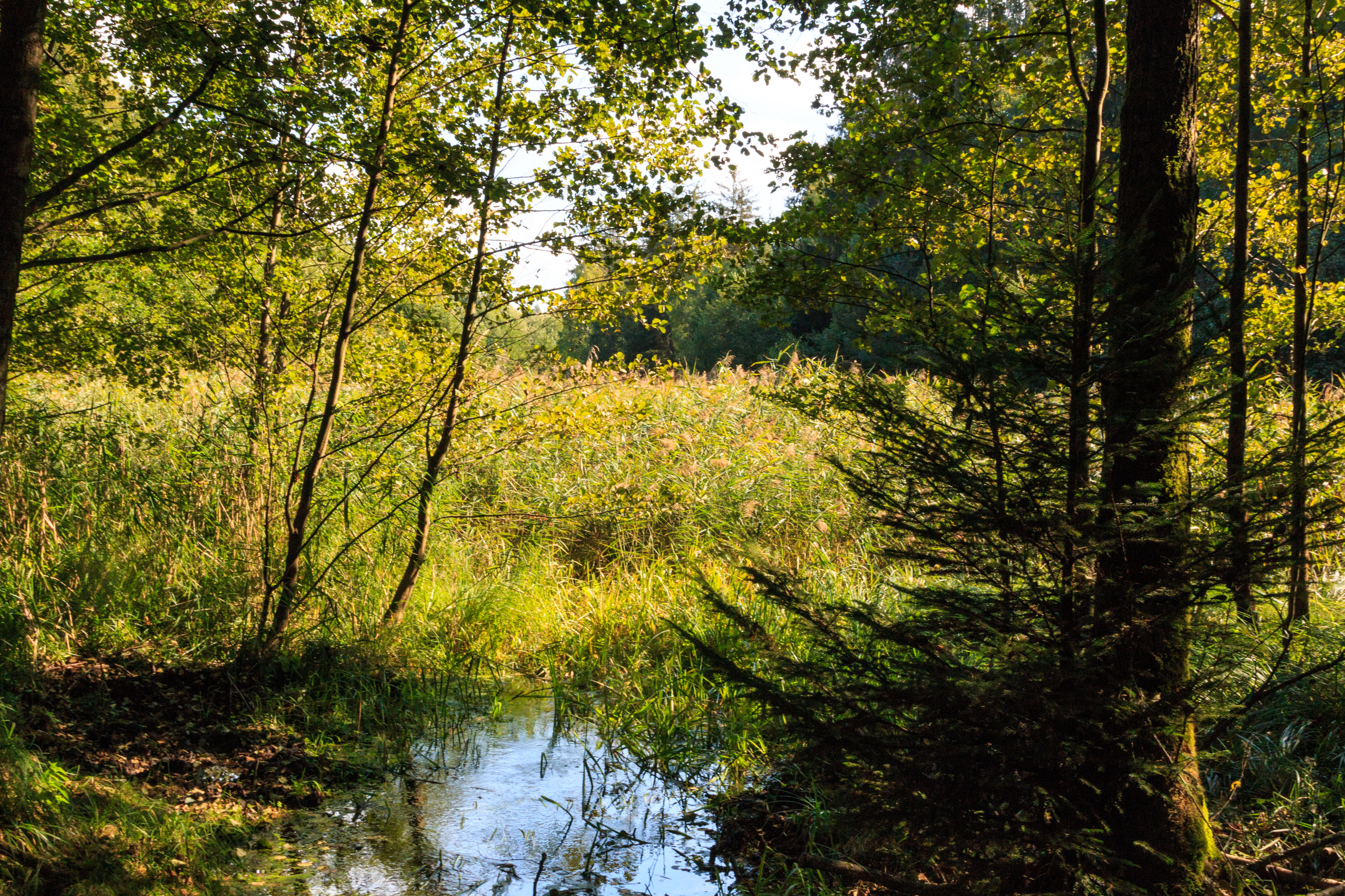 Černý rybník u Hradčan Project: Vodstvo.